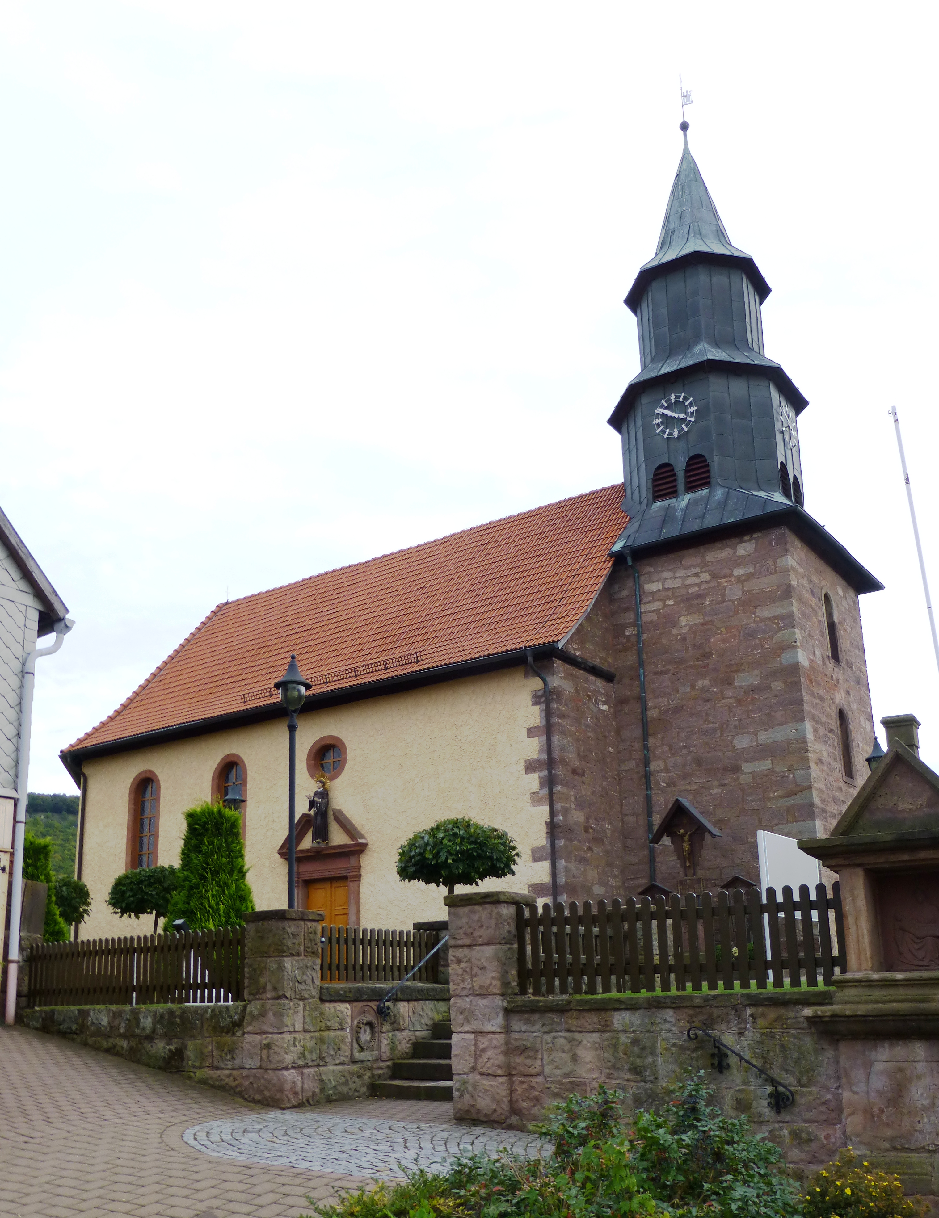 Katholische Kirche St. Leonhard in Birkenfelde, Landkreis Eichsfeld, Thüringen. Erbaut 1708 bis 1711